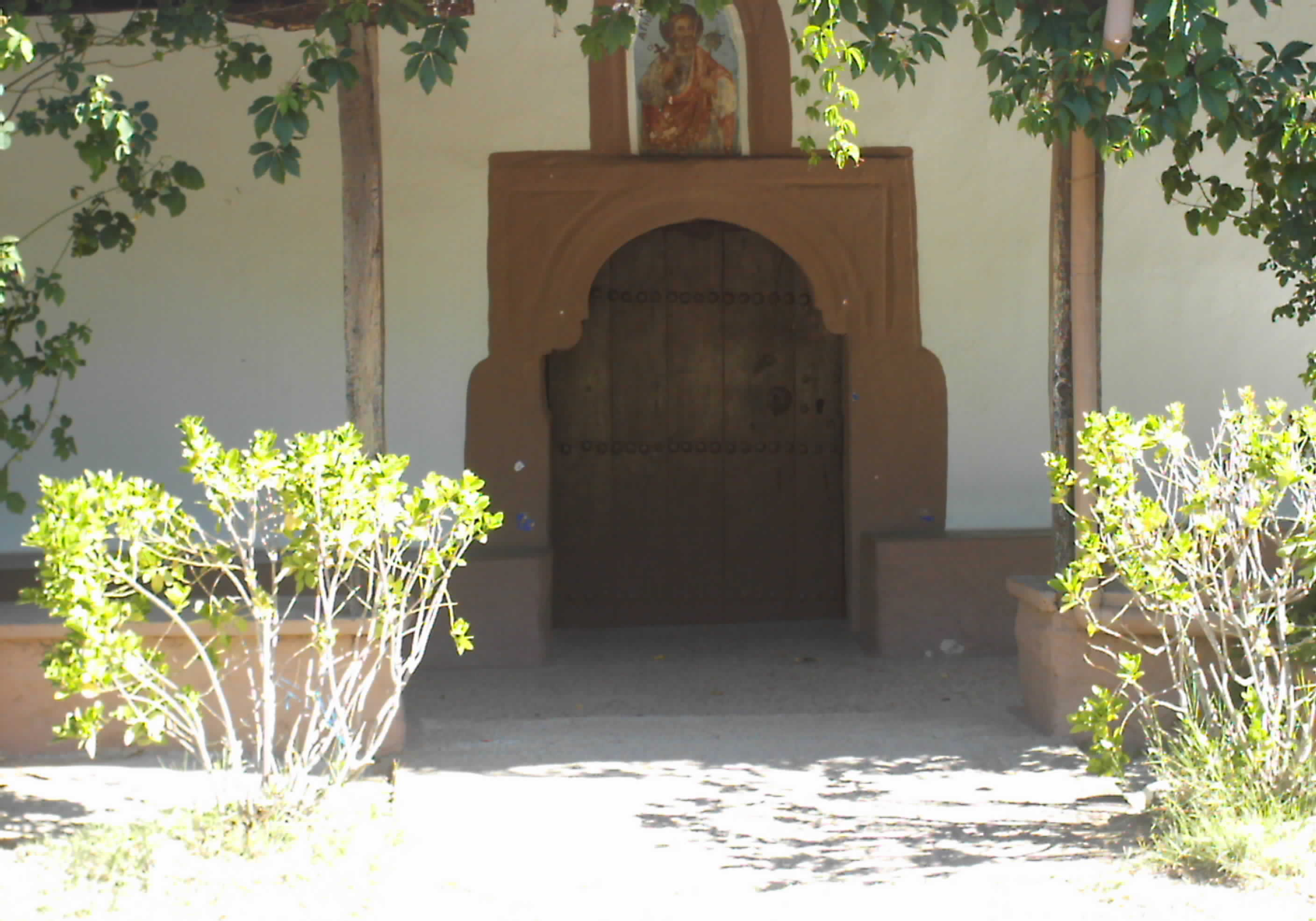 Agios Xristoforos